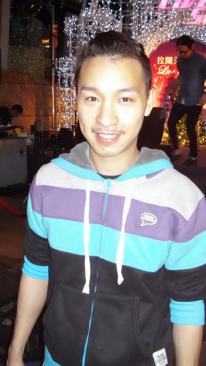 中文（香港）: 香港歌手吳彤的樣子